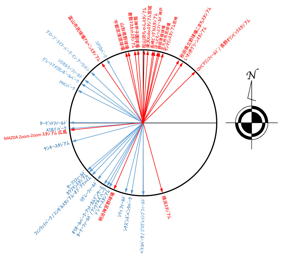 日米の野球場の方位（本塁位置）を表したもの